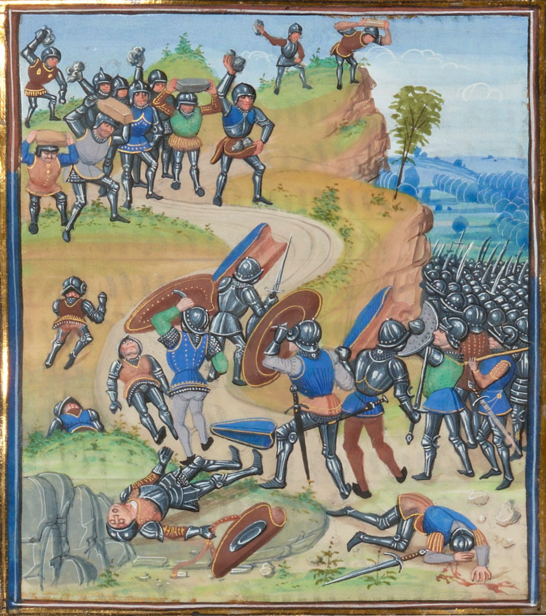 Bataille de Brignais (1362). L'armée française est vaincue par les Grandes Compagnies, bandes de mercenaires ravageant la France pendant la guerre de Cent Ans.